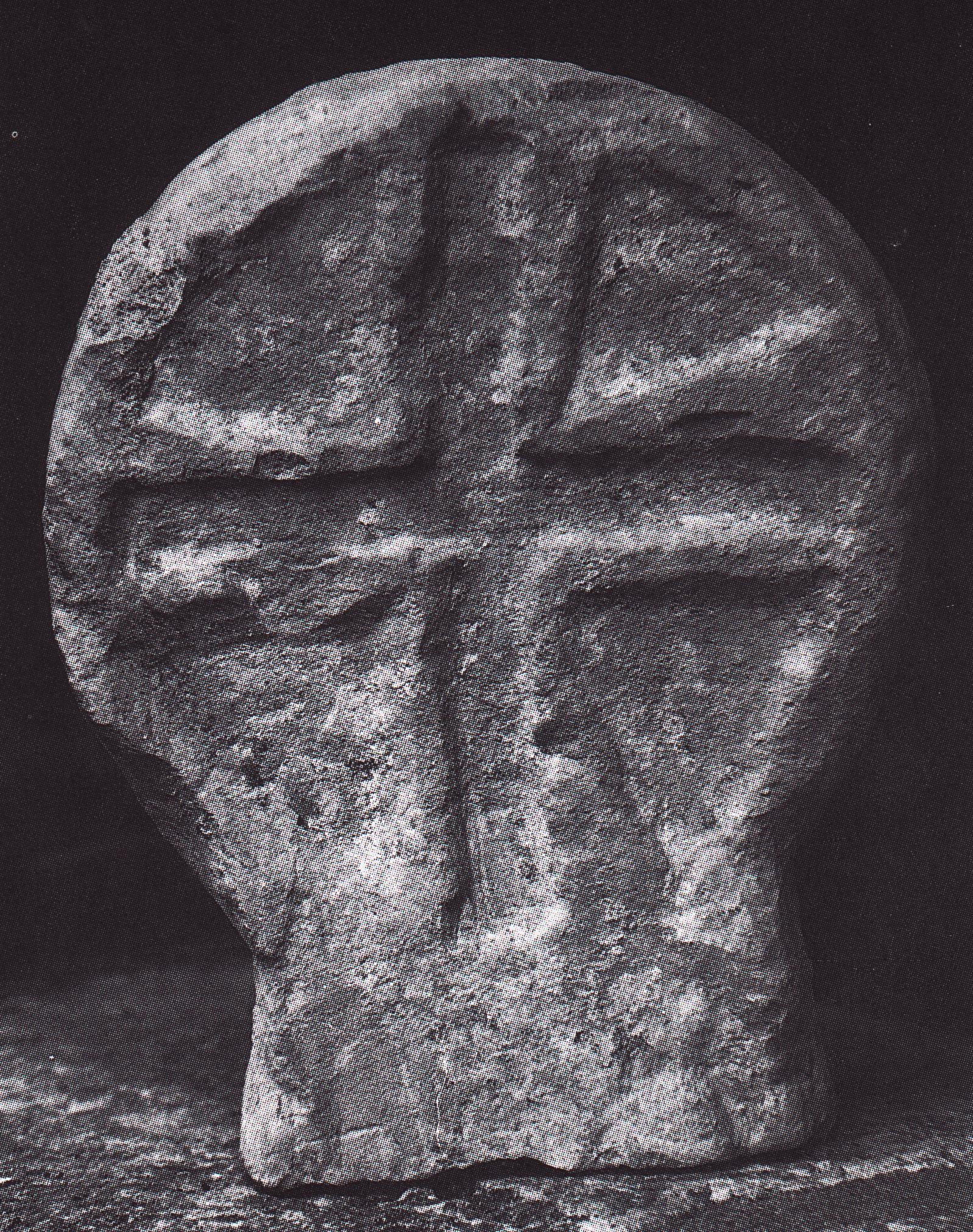 Estela mozárabe de la ermita de Santa Cecilia. Barriosuso(Burgos)